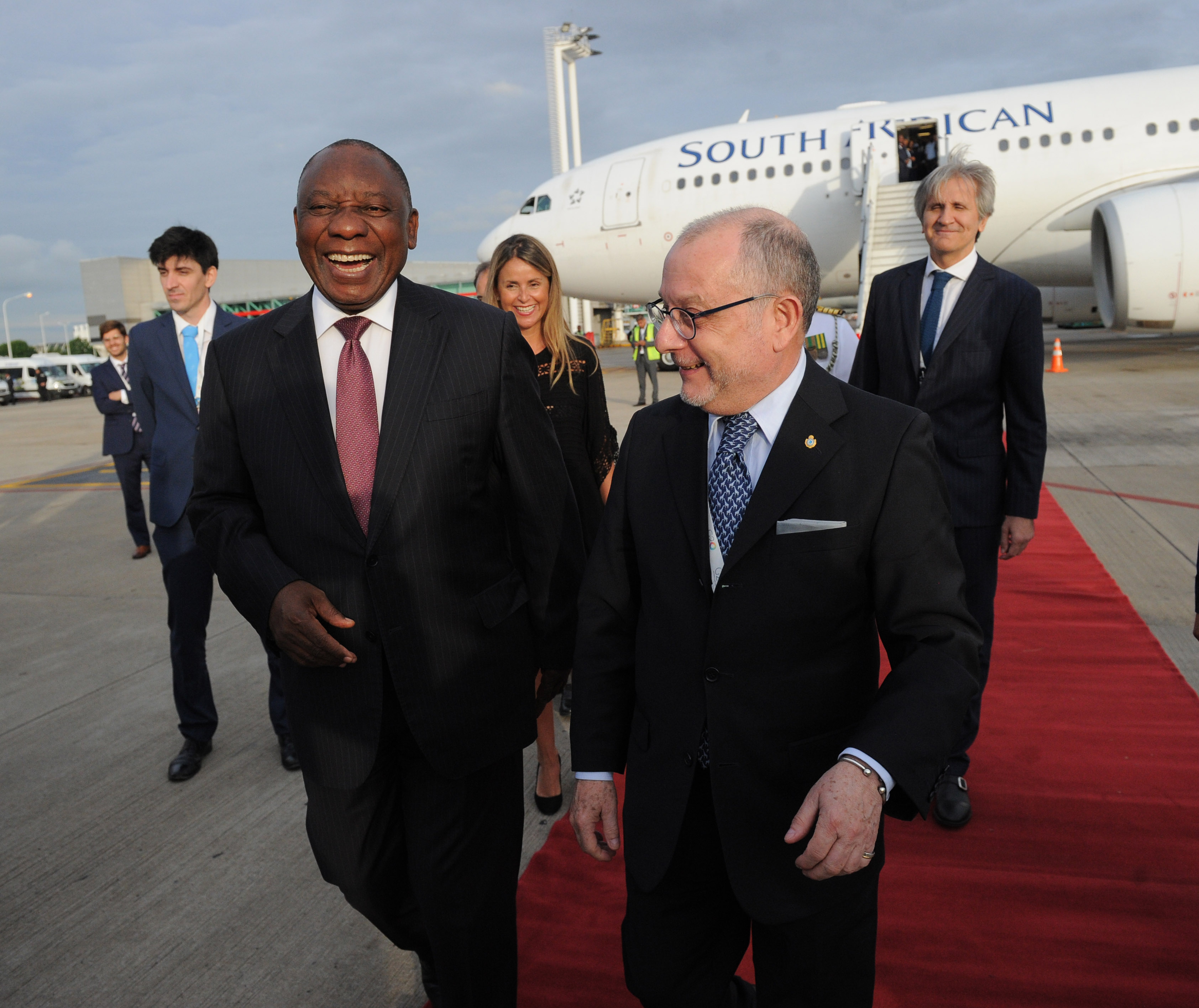 Llegada de Cyril Ramaphosa, presidente de Sudáfrica